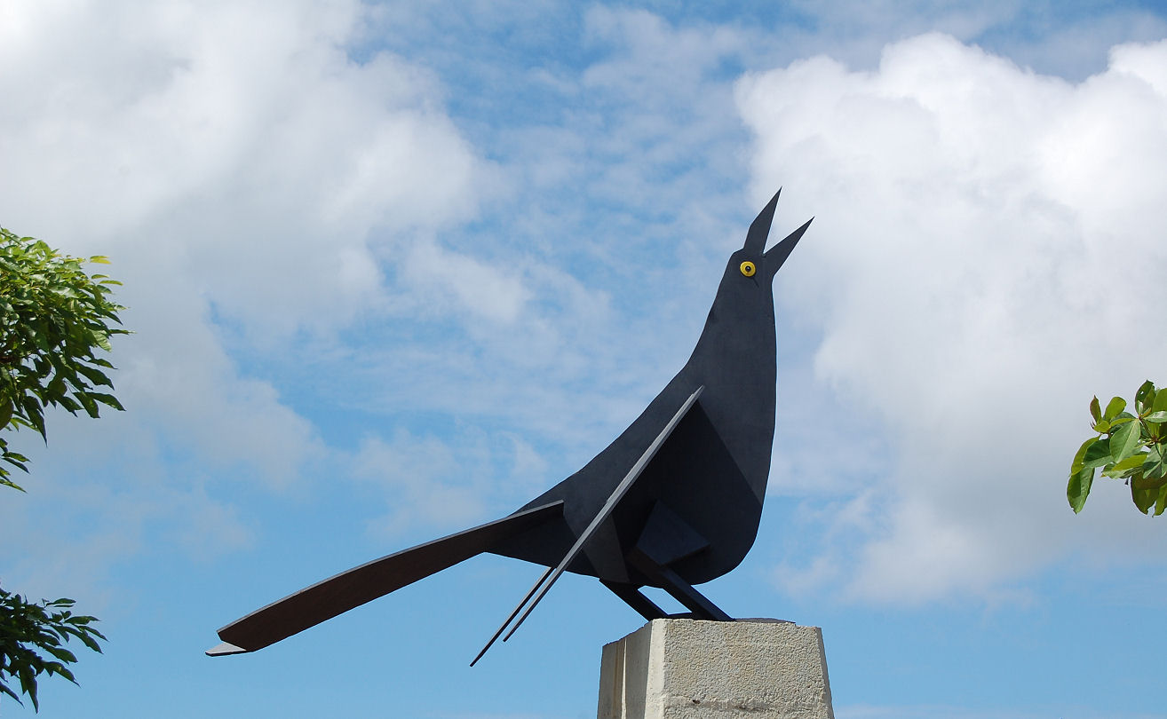 Cartagena de Indias (Colombia) monumento a La María Mulata.